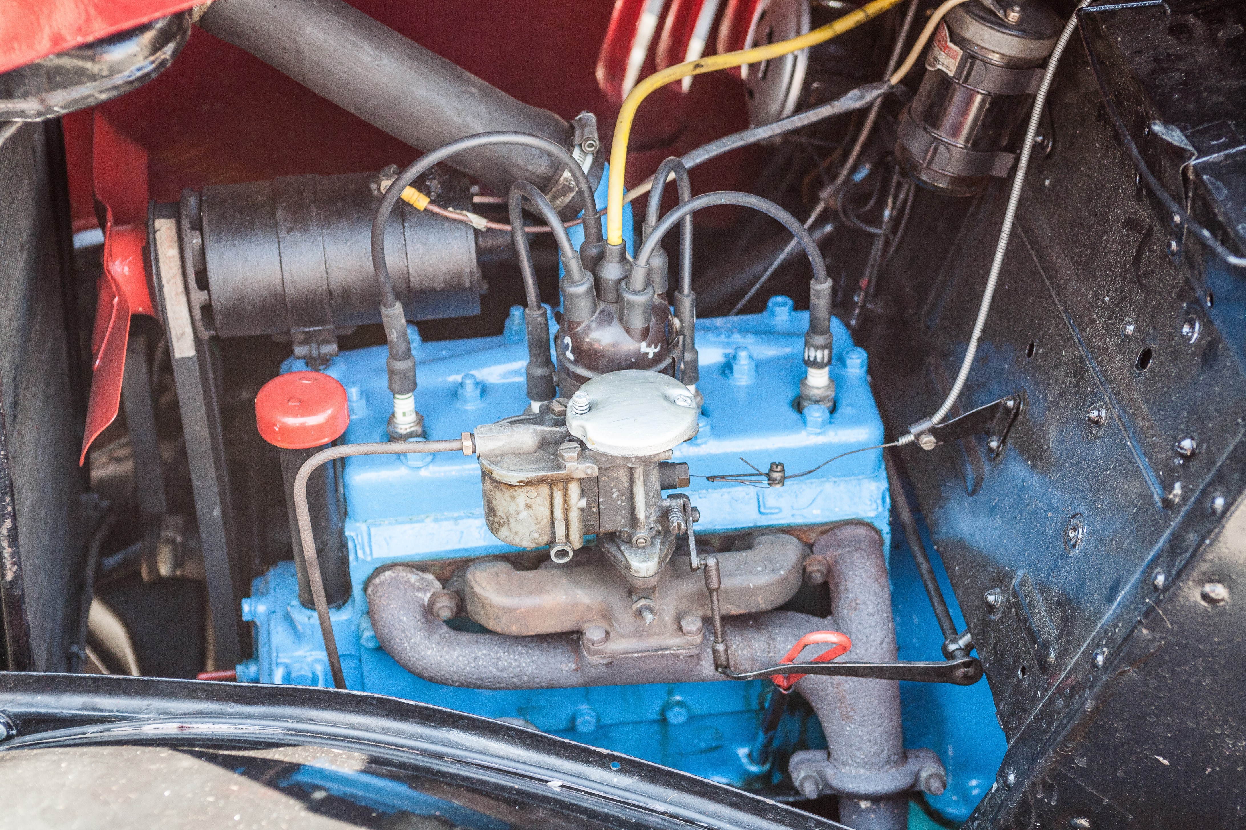 Rheinbach Classics 2007 – Motorraum eines Ford Modell Y